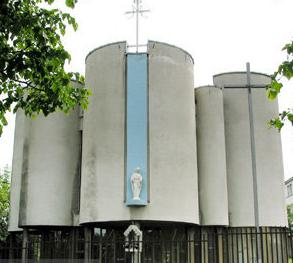 PCC Blessed Virgin Mary of Angel Quinn Cathedral Katedra Kościoła Polskokatolickiego pw. Matki Bożej Królowej Aposotłów w Częstochowie